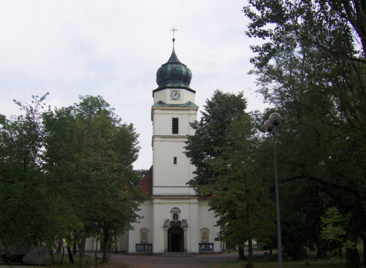 Kościół parafialny p.w. Św. Stanisława B. i M. z 1912r